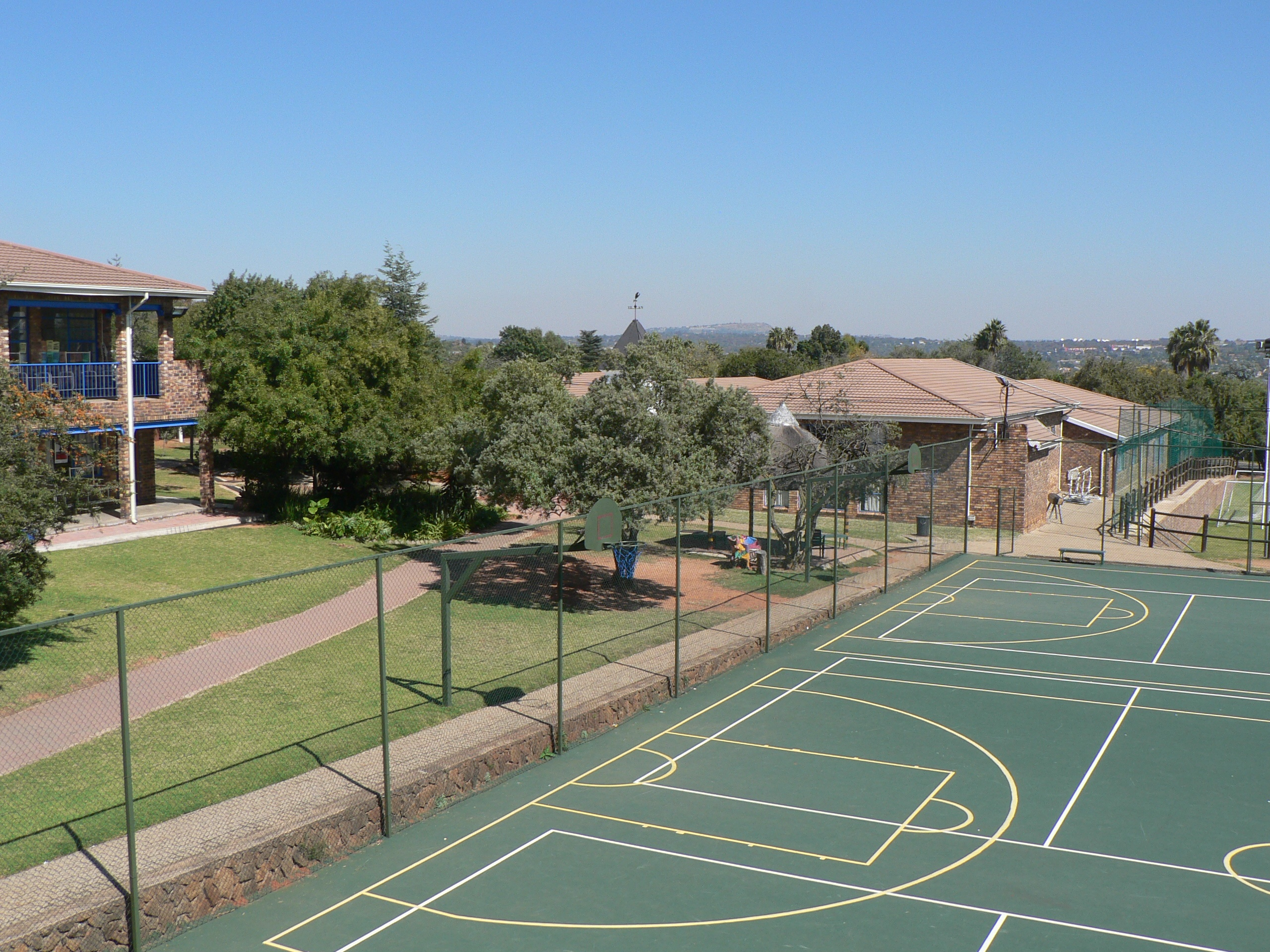 Campus de Johannesburg